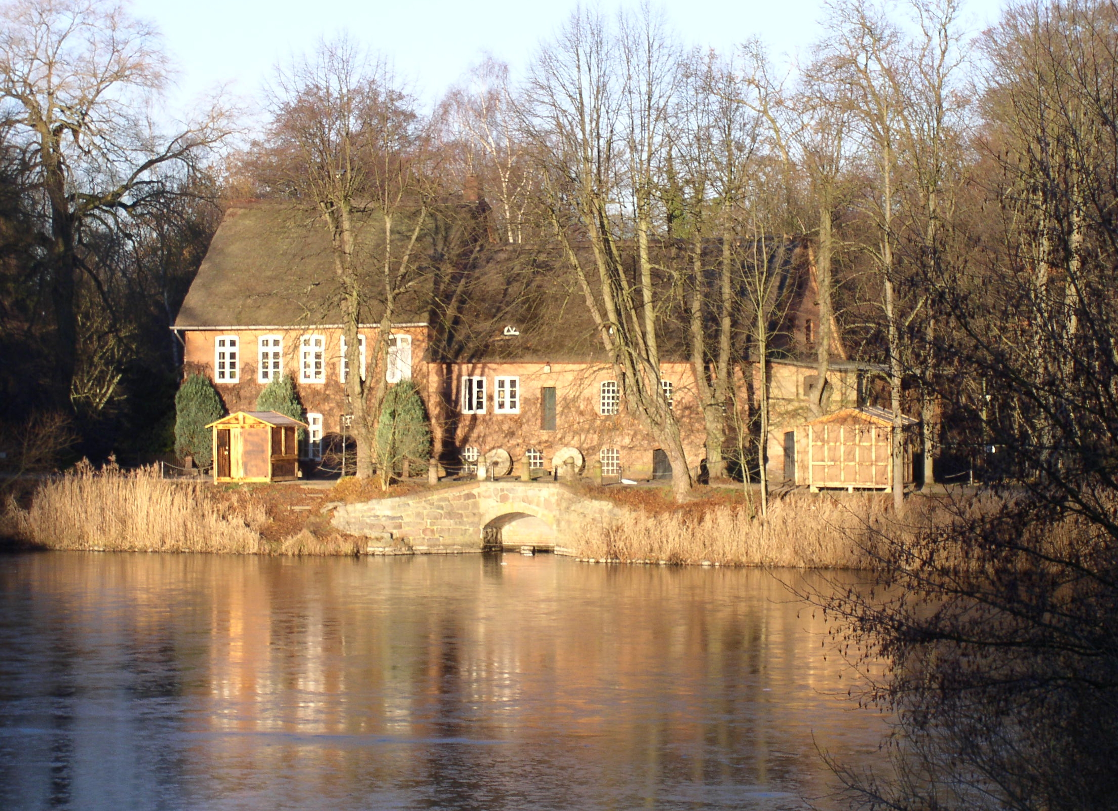 Schnappschuss im Winter 2003 Morgens in Ahrensburg.